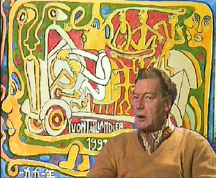 Portrait de Yvon Taillandier